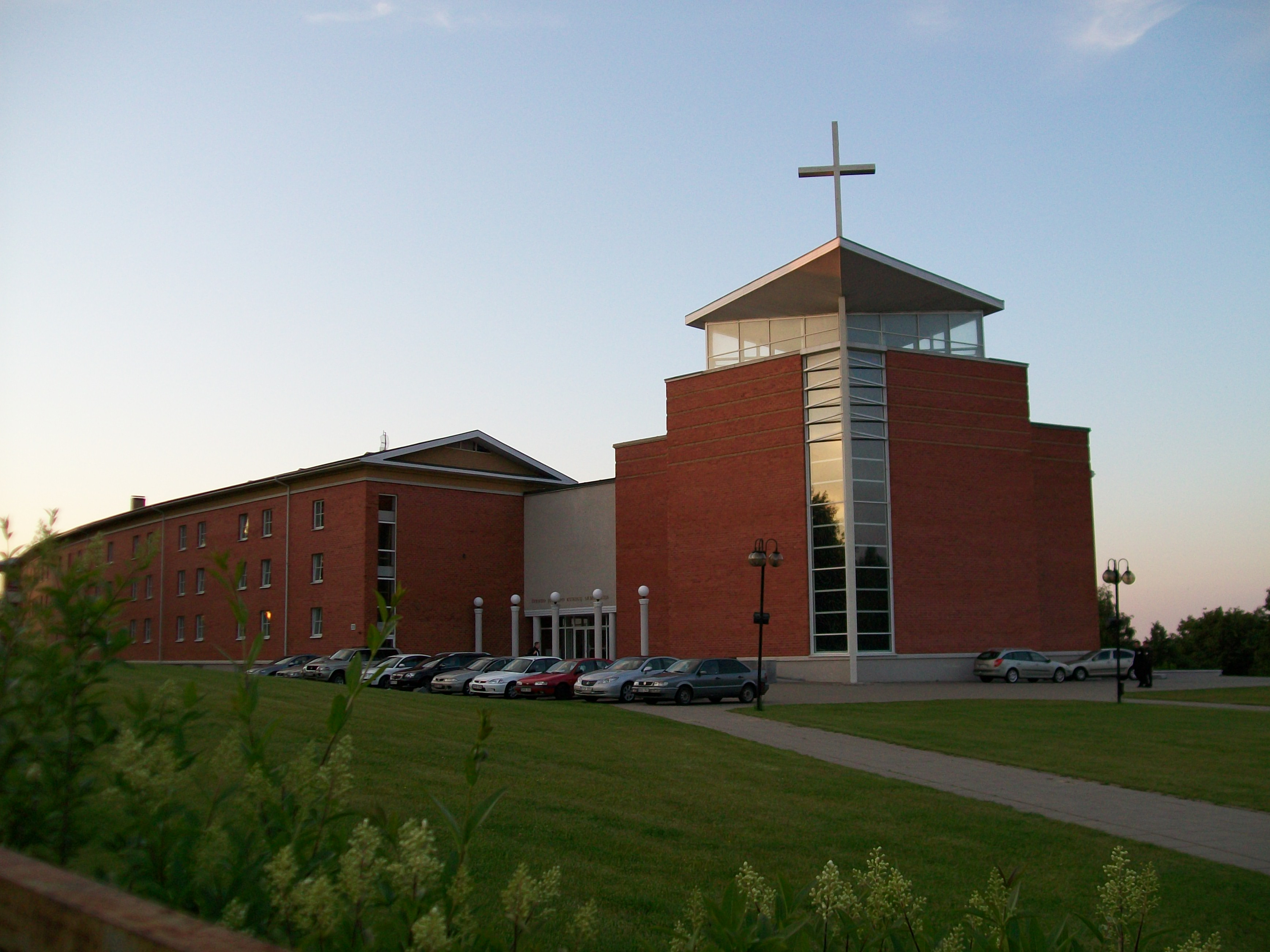 Vilnius priest seminary